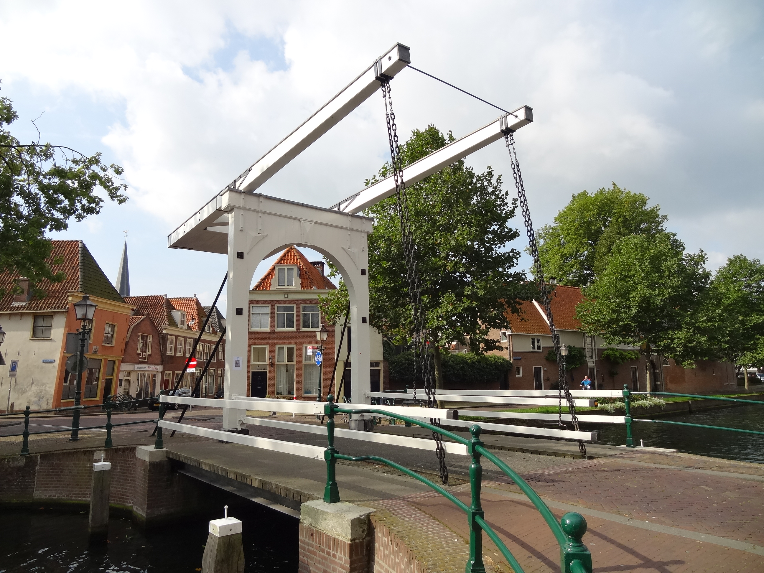 Klapbrug tegenover de Oostindische Pakhuizen. Hier gezien vanaf het Buurtje naar de Muntstraat en de Weeshuistuin.